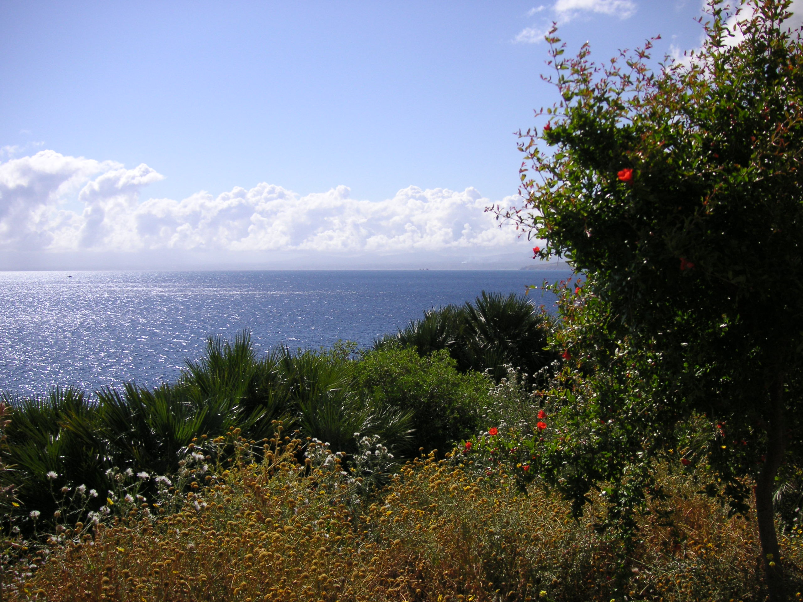 Zingaro, Sicily